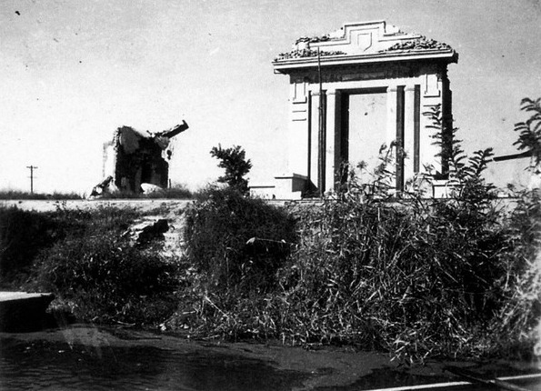 被炸后的南开大学秀山堂残迹